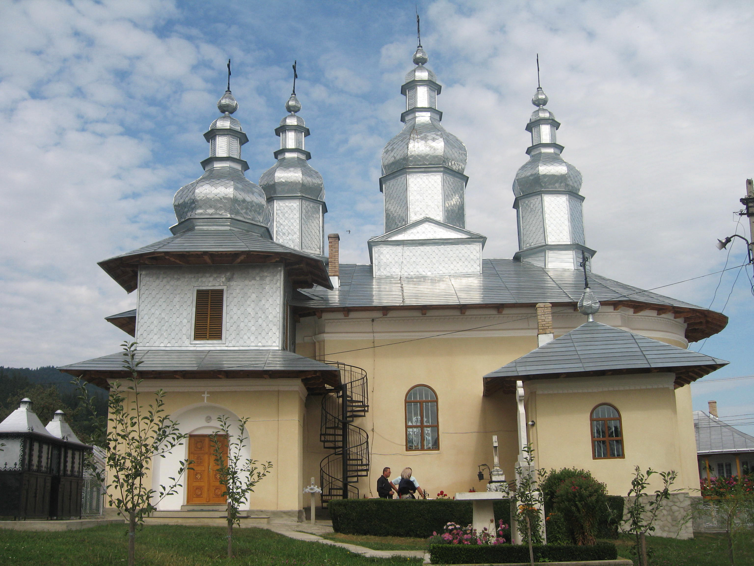 Mănăstirea Văratec